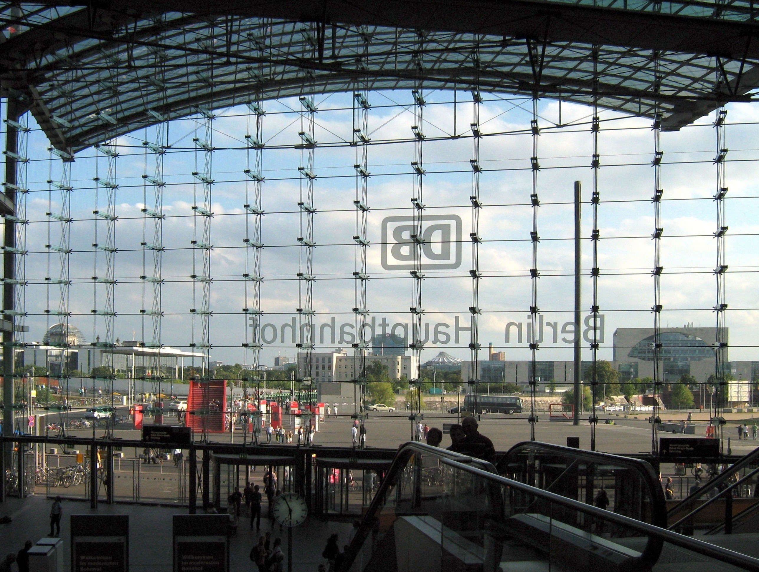 Berlin Hauptbahnhof - Blick von innen zu den Regierungsgebäuden